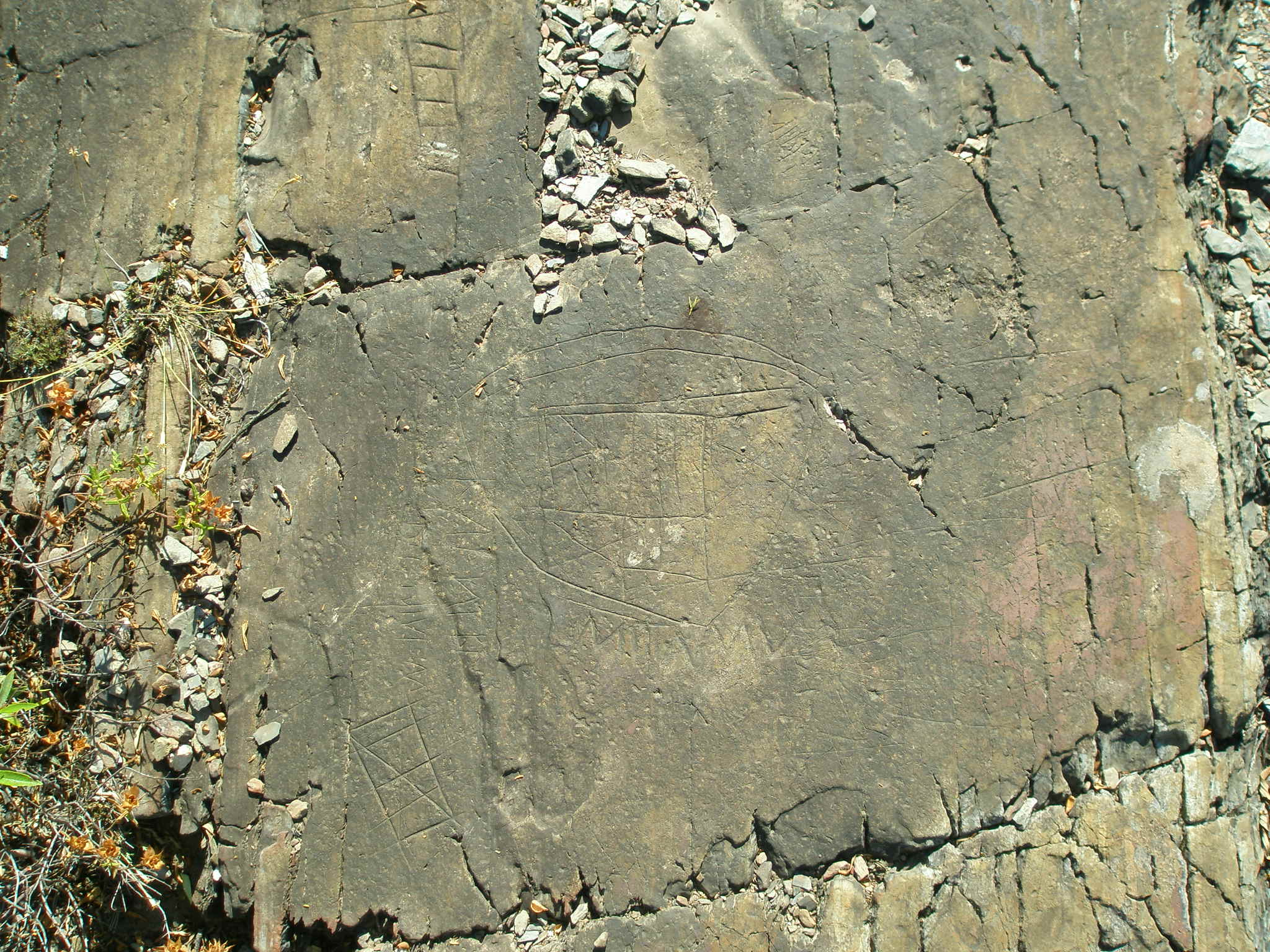 arte rupestre na Estação de arte rupestre da Fechadura, a nordeste da Feiteira, freguesia de Figueiredo, Sertã.